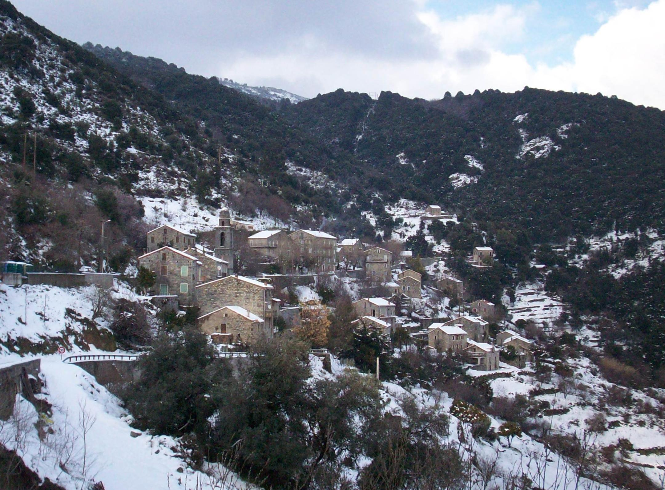 Le village de Cargiaca